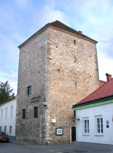 Stadtmuseum Ungarturm (Bruck an der Leitha)